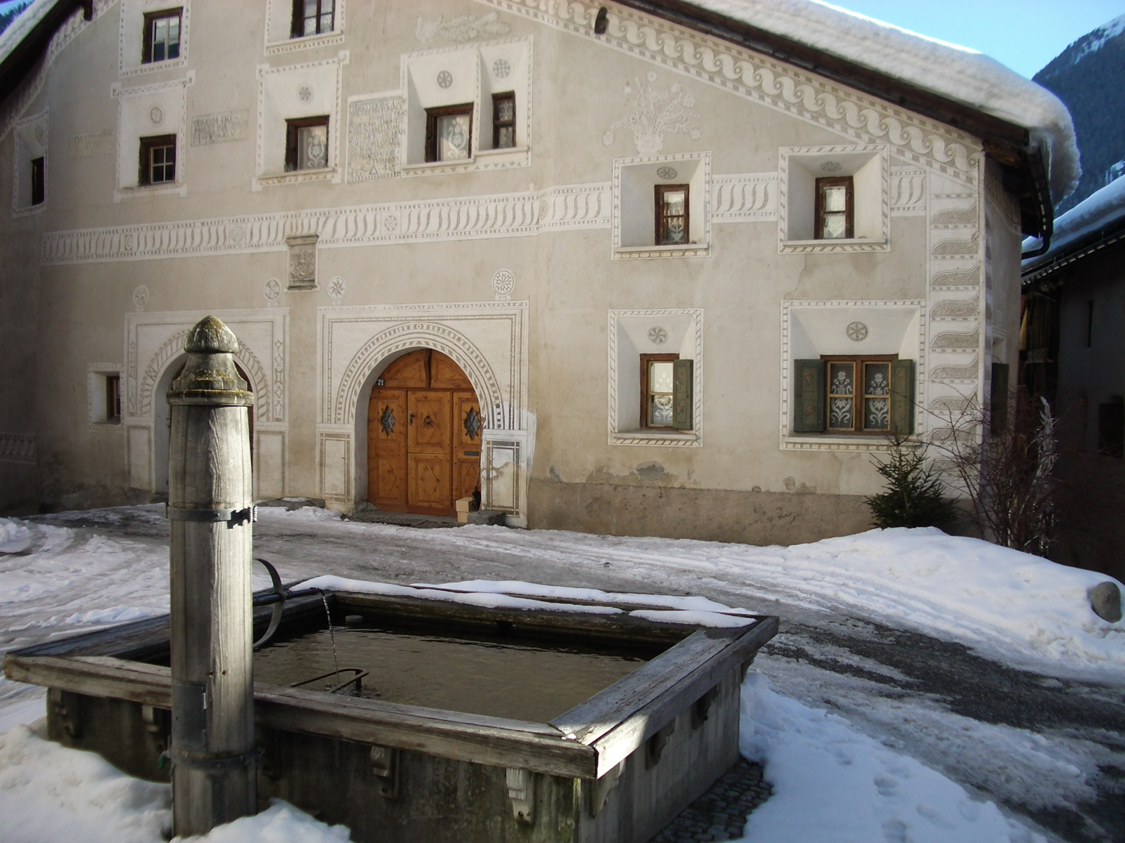 Piazetta, Ardez GR, Schweiz